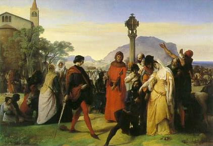 scene 3